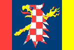 Česky: Vlajka obce Radvanice